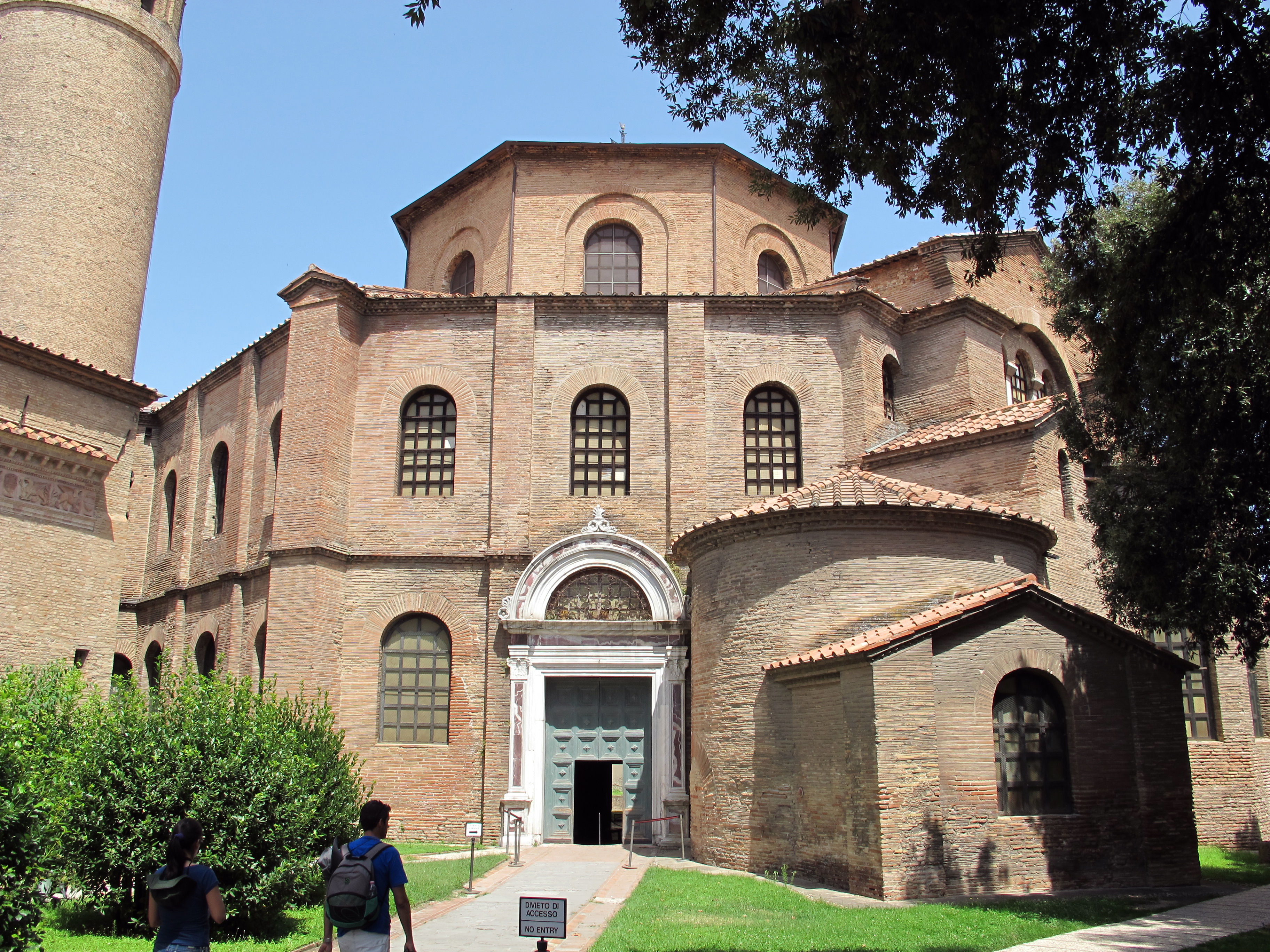 Basilica di San Vitale - MIBAC This is a photo of a monument which is part of cultural heritage of Italy.